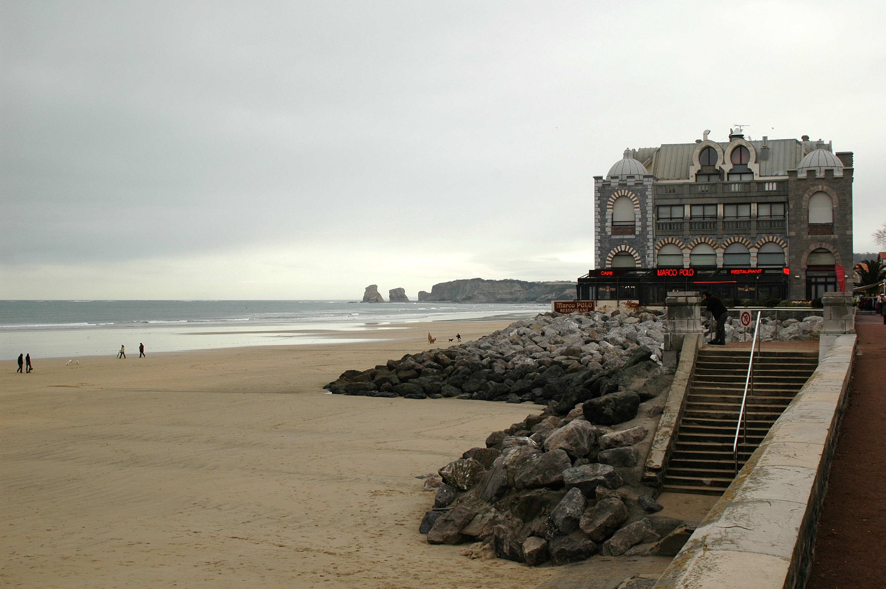 Hendaye, la plage. Photo prise le 06/01/07 par Harrieta171